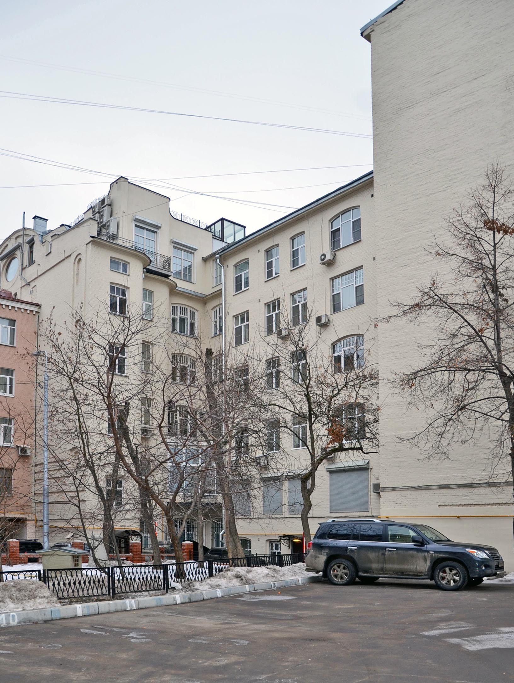 Доходный дом Исакова вид со двора